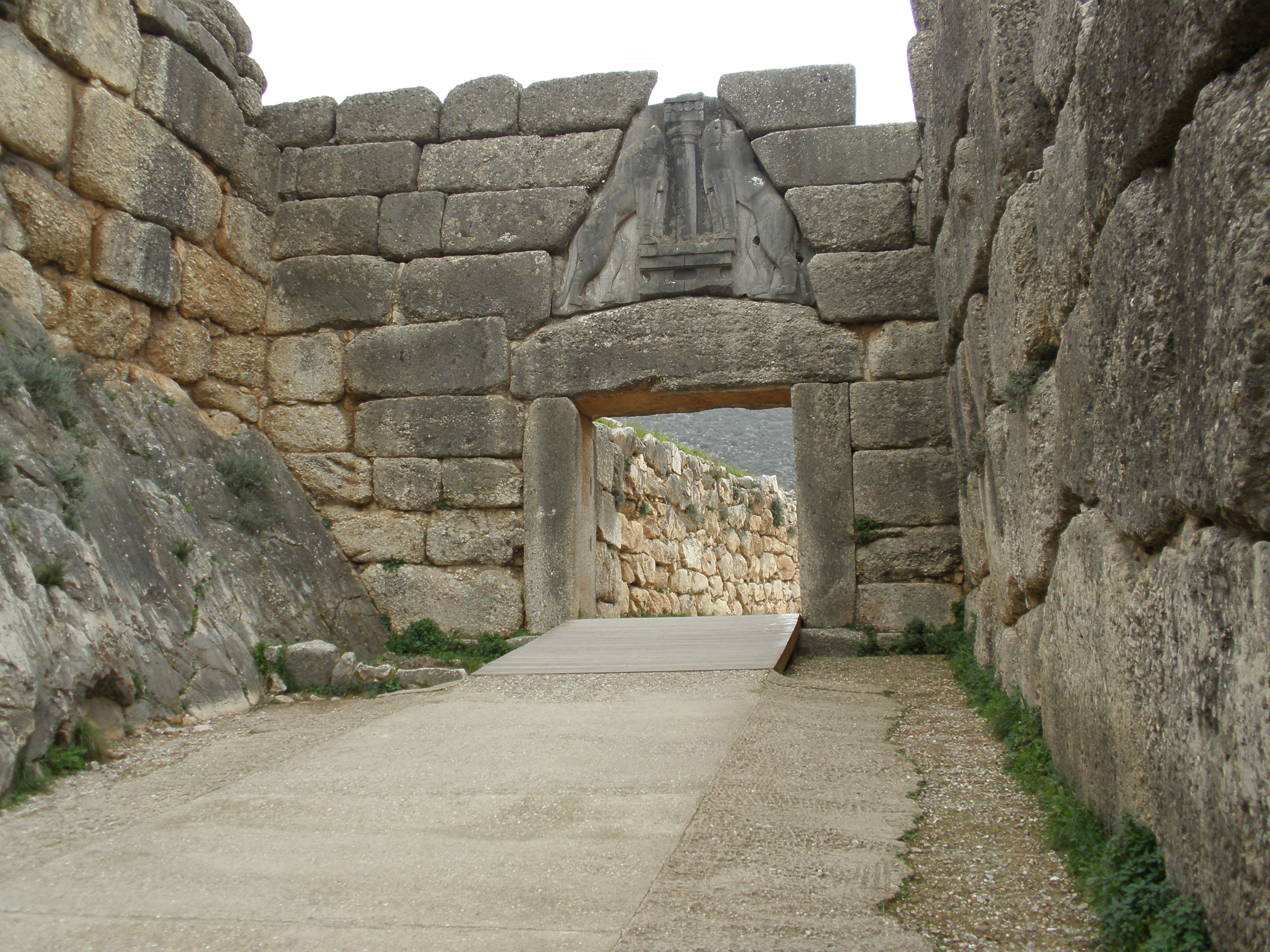 Πύλη Λεόντων«Πύλη Λεόντων»